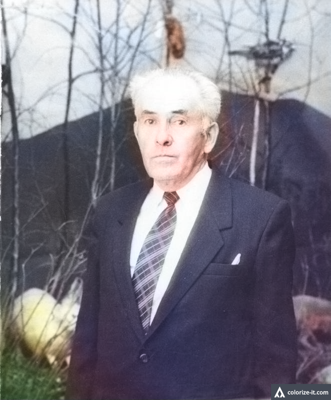 Основатель музея